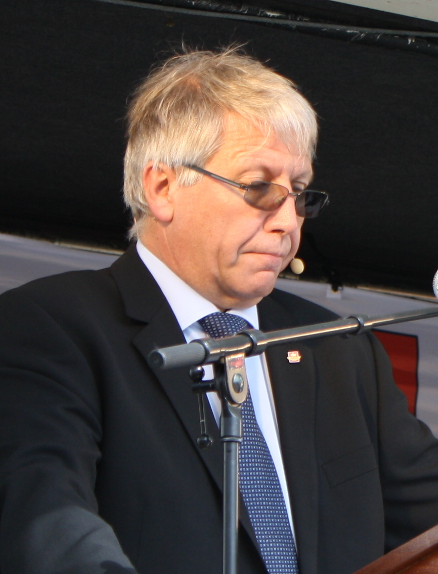 Vegdirektør Terje Moe Gustavsen holder tale i forbindelse med åpningen av Nordre avlastningsveg.